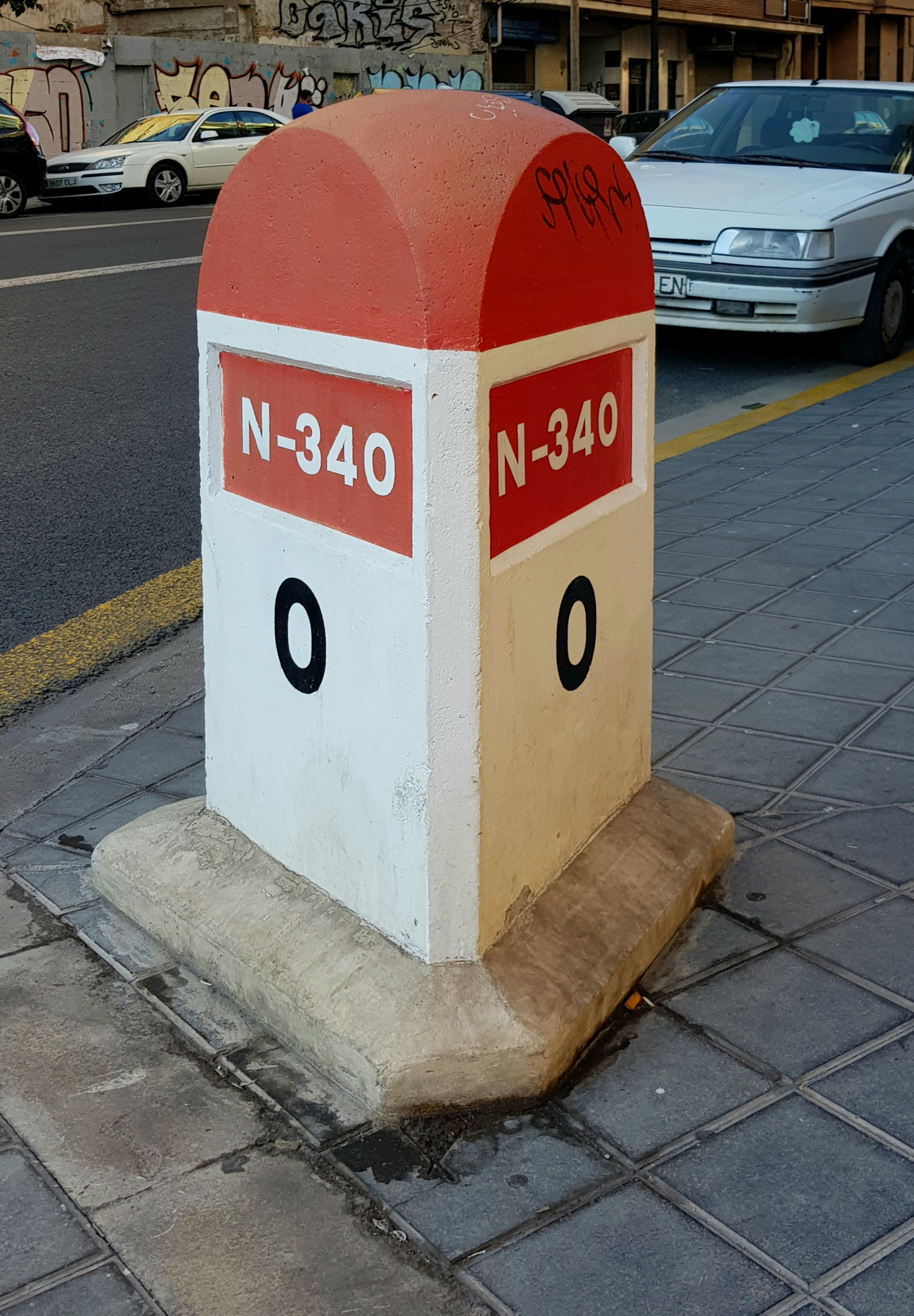 Molló de la N-340 al principi de l'avinguda de la Constitució, València.